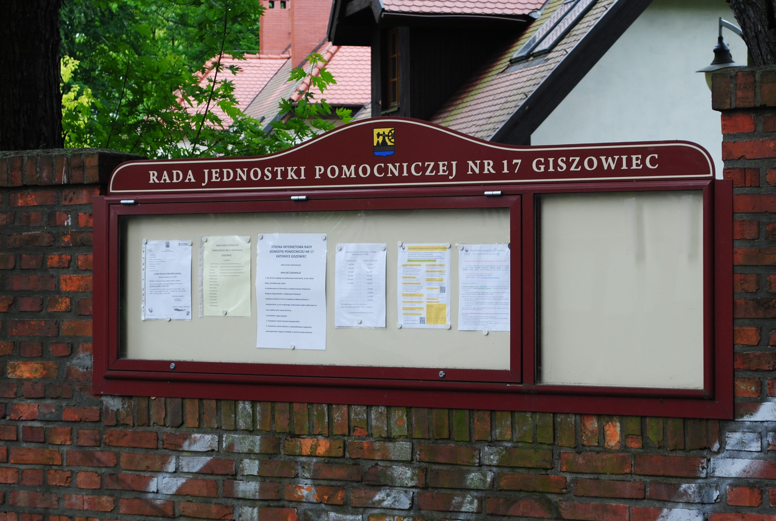 Katowice - Giszowiec. Ulica Gościnna. Tablica ogłoszeń RJP nr 17